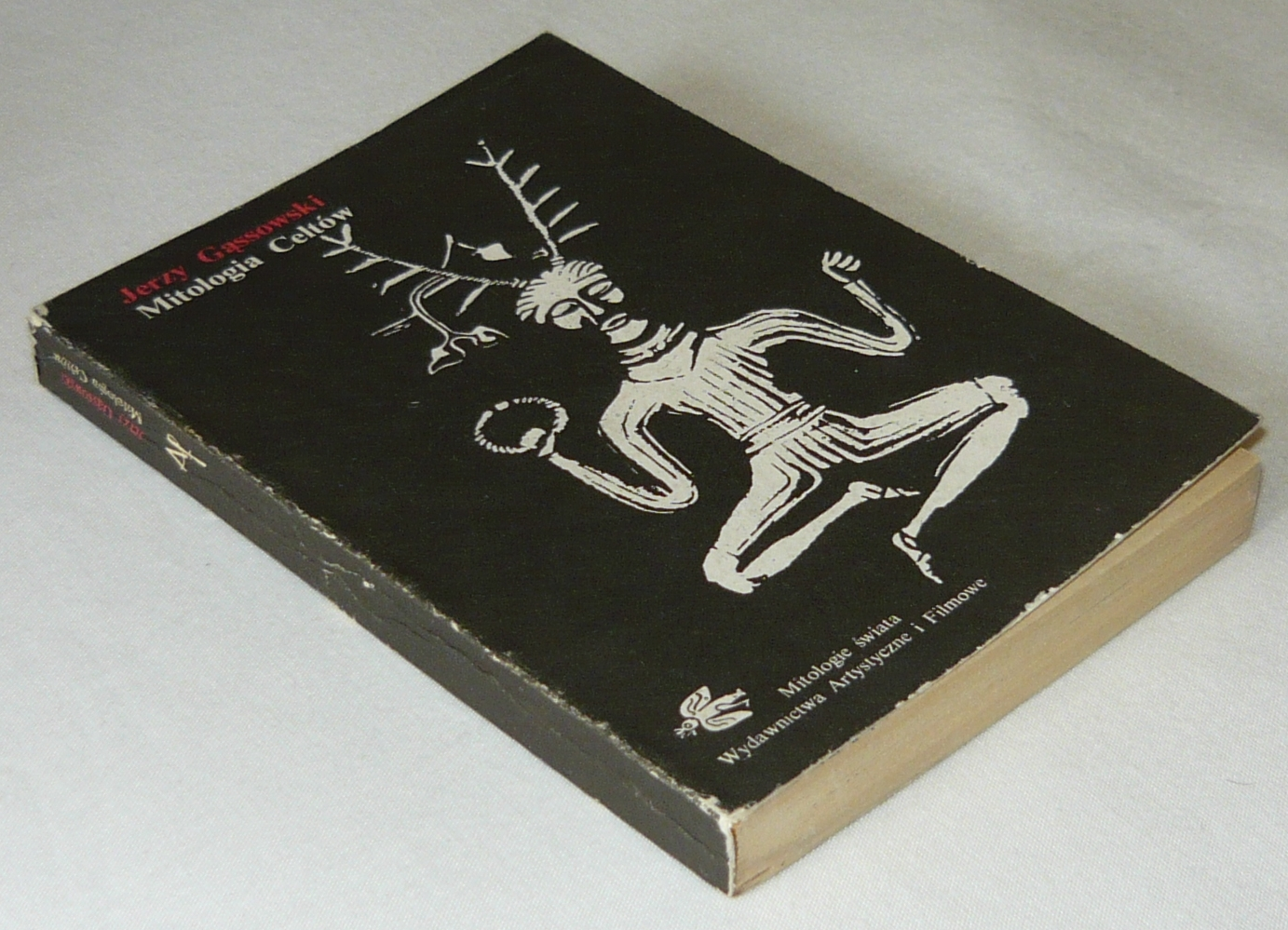 Mitologia Celtów Jerzego Gąssowskiego z serii 'Mitologie świata', Wydawnictwa Artystyczne i Filmowe.